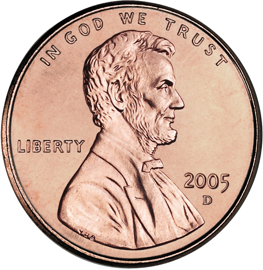 2005 US cent, obverse side